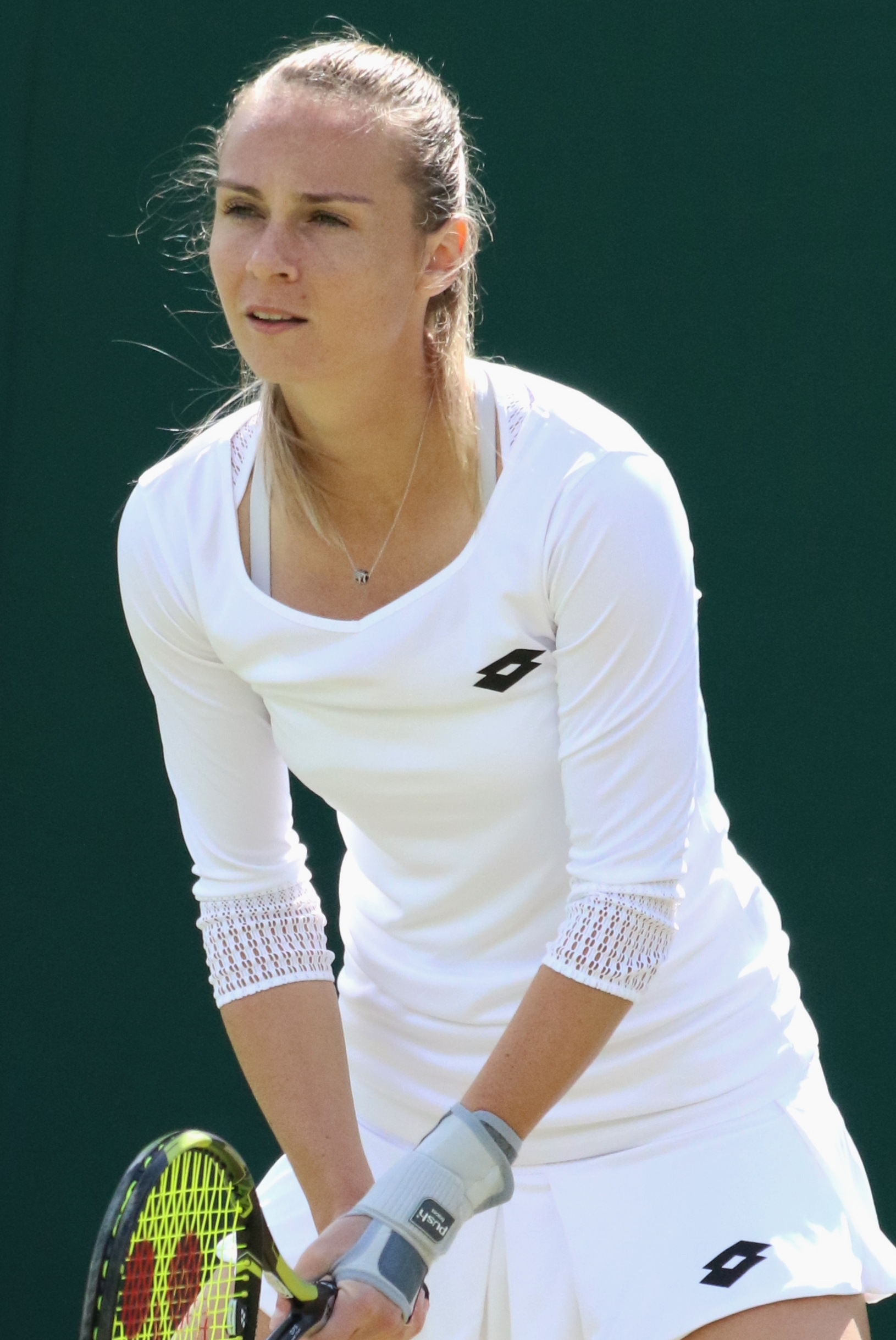 Rybarikova WM16 (9)